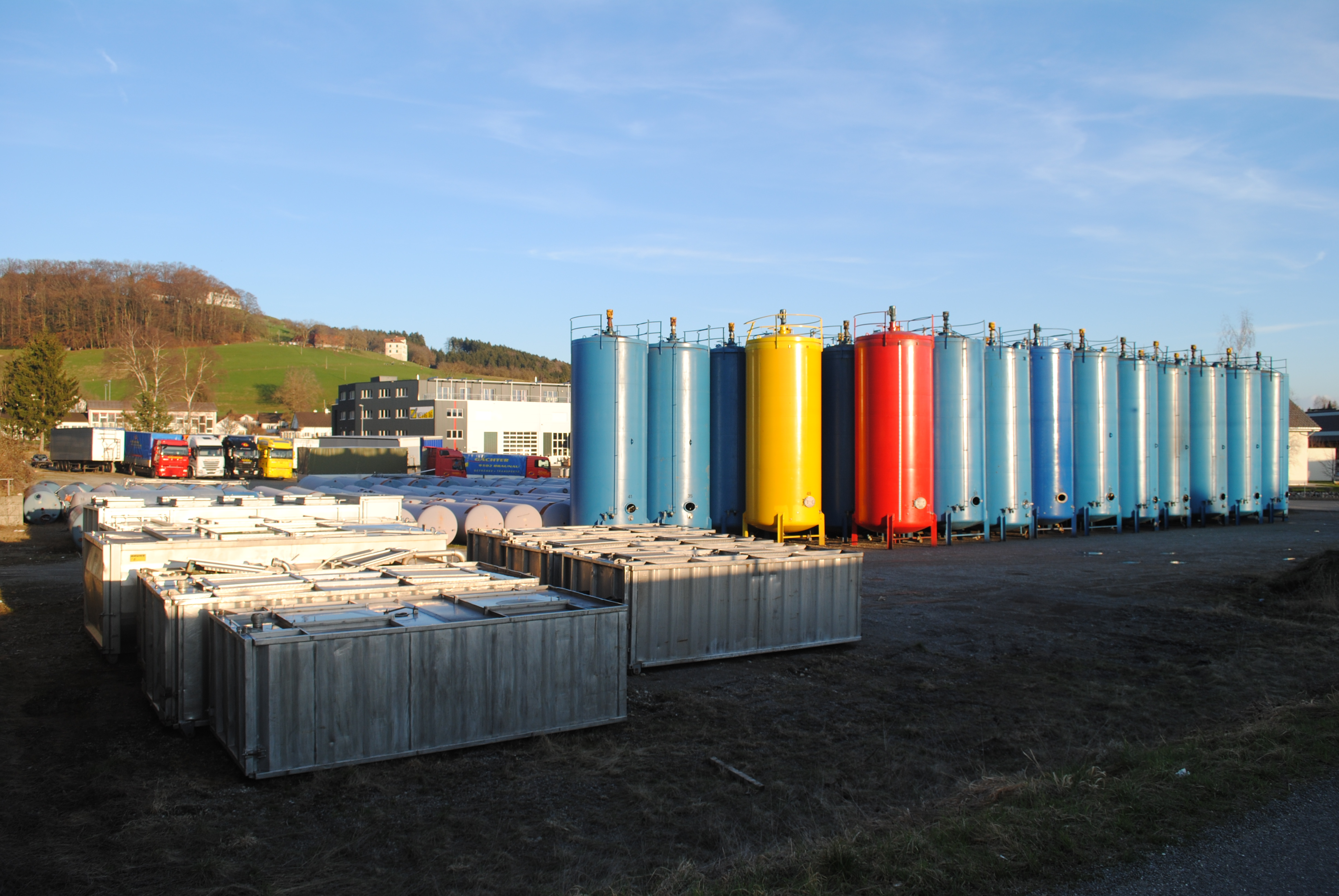 Tanks